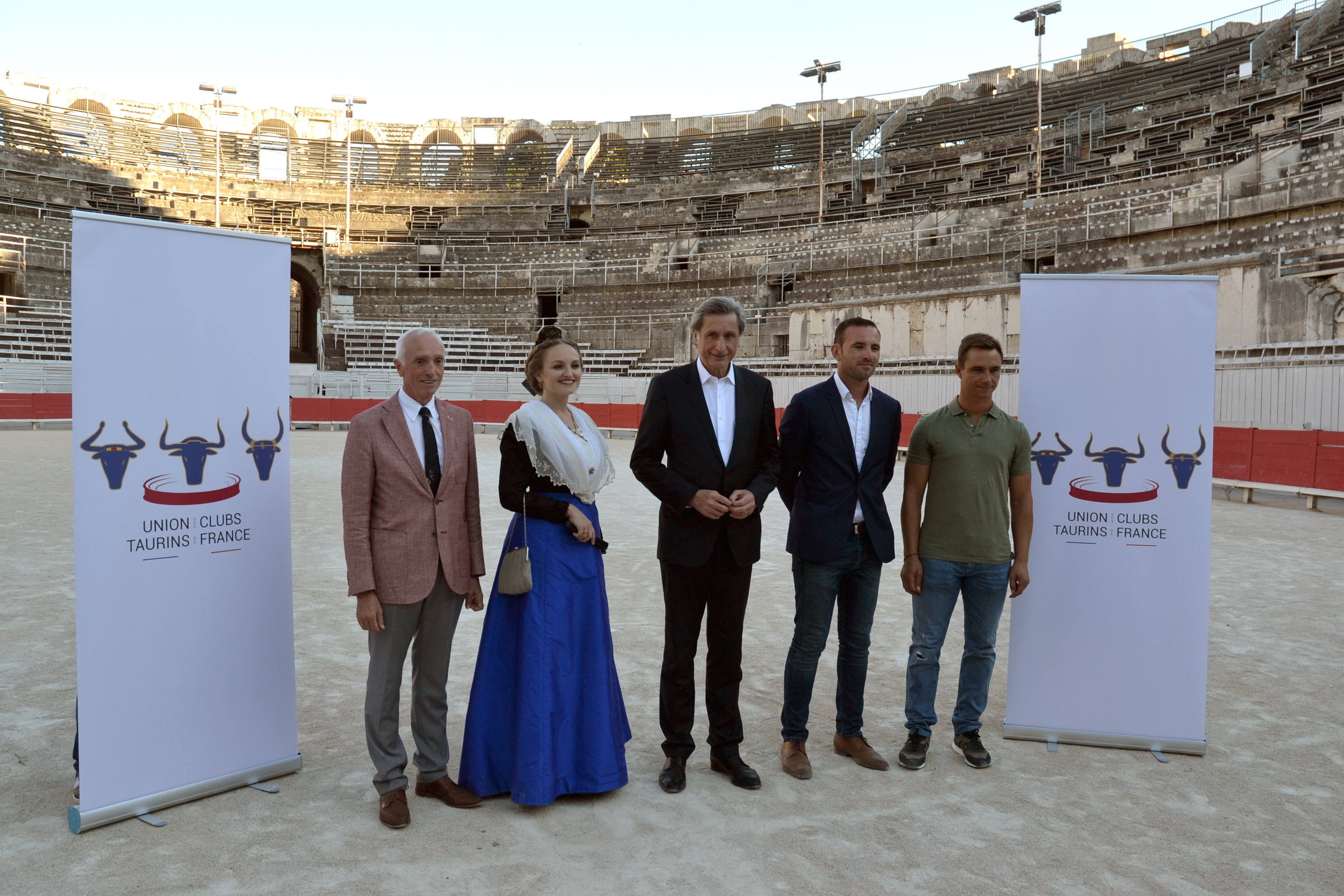 Personnalités lors de la présentation du logo